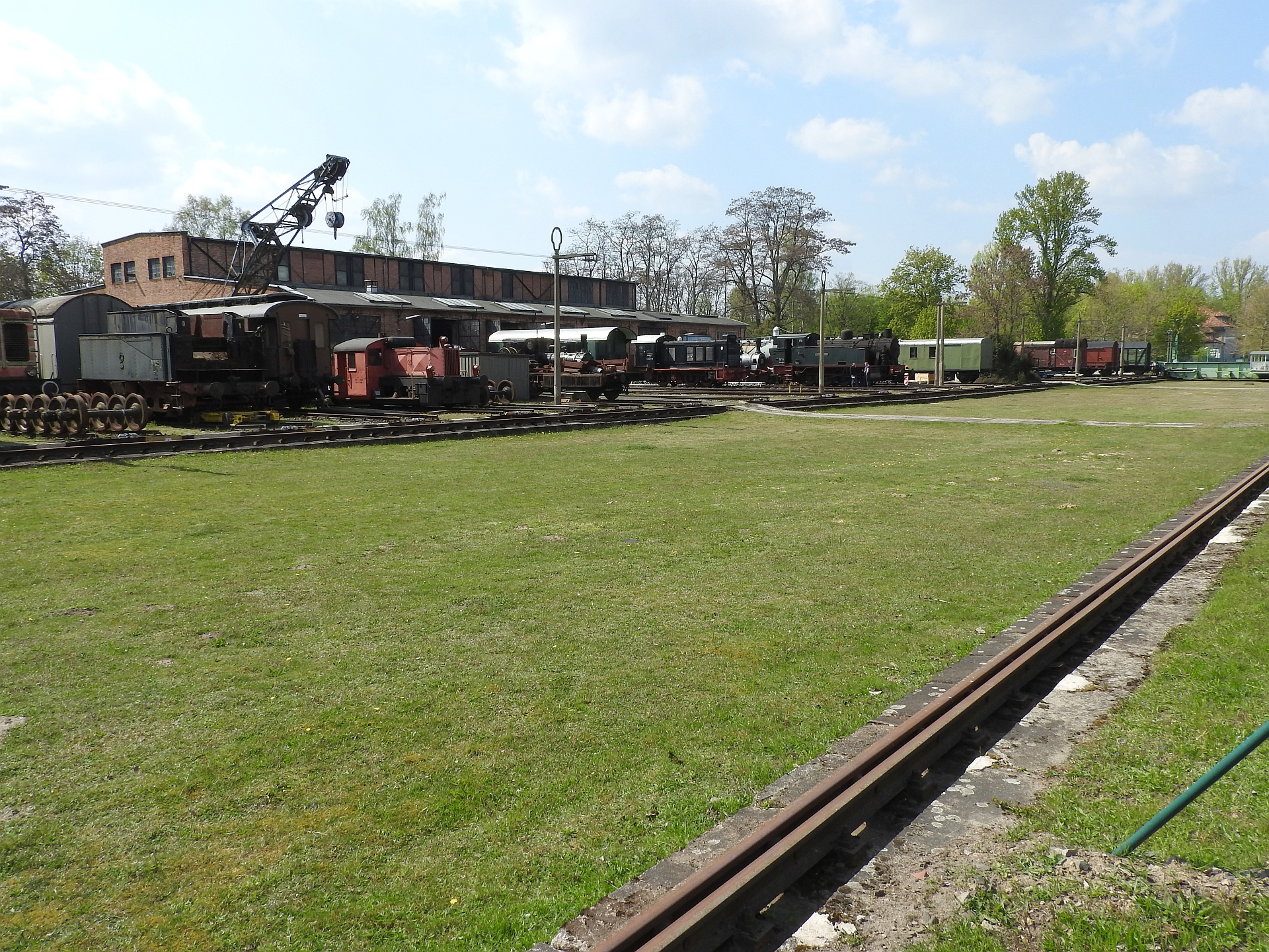 Lokpark Braunschweig, 01.05.2016